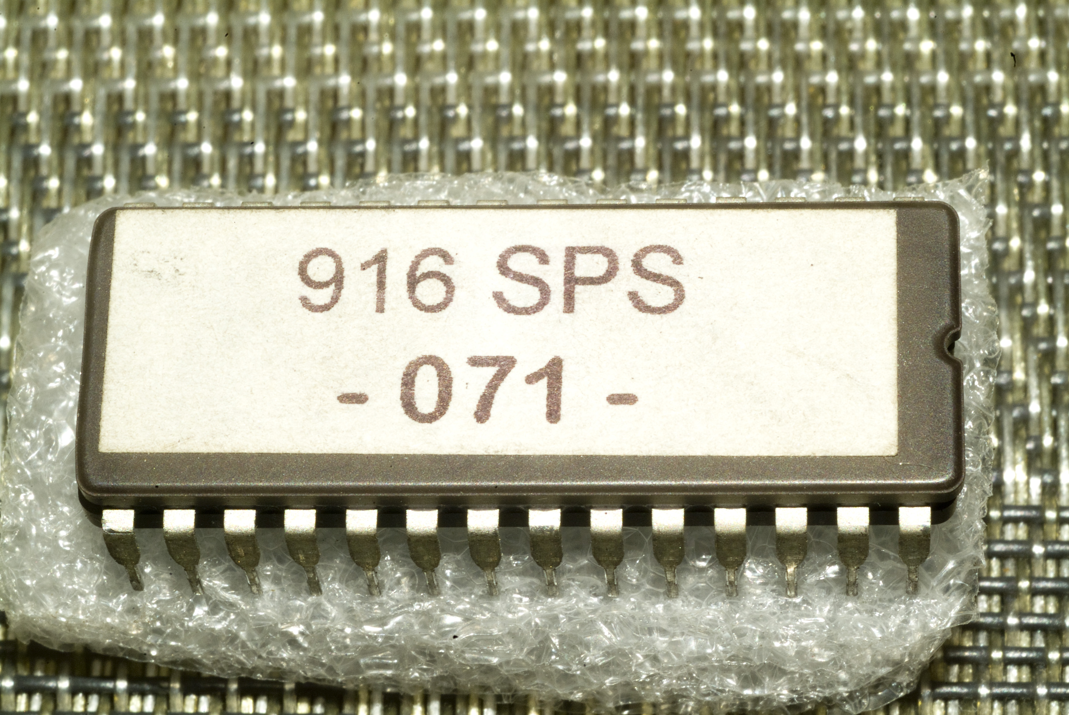 EPROM der Einsprizanlage Ducati 916SPS